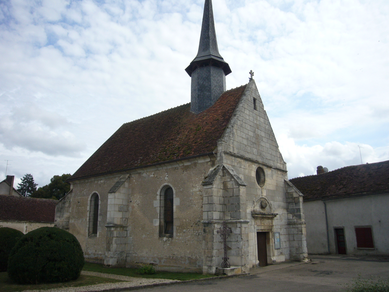 Vallan (Yonne) Eglise St Jean Baptiste